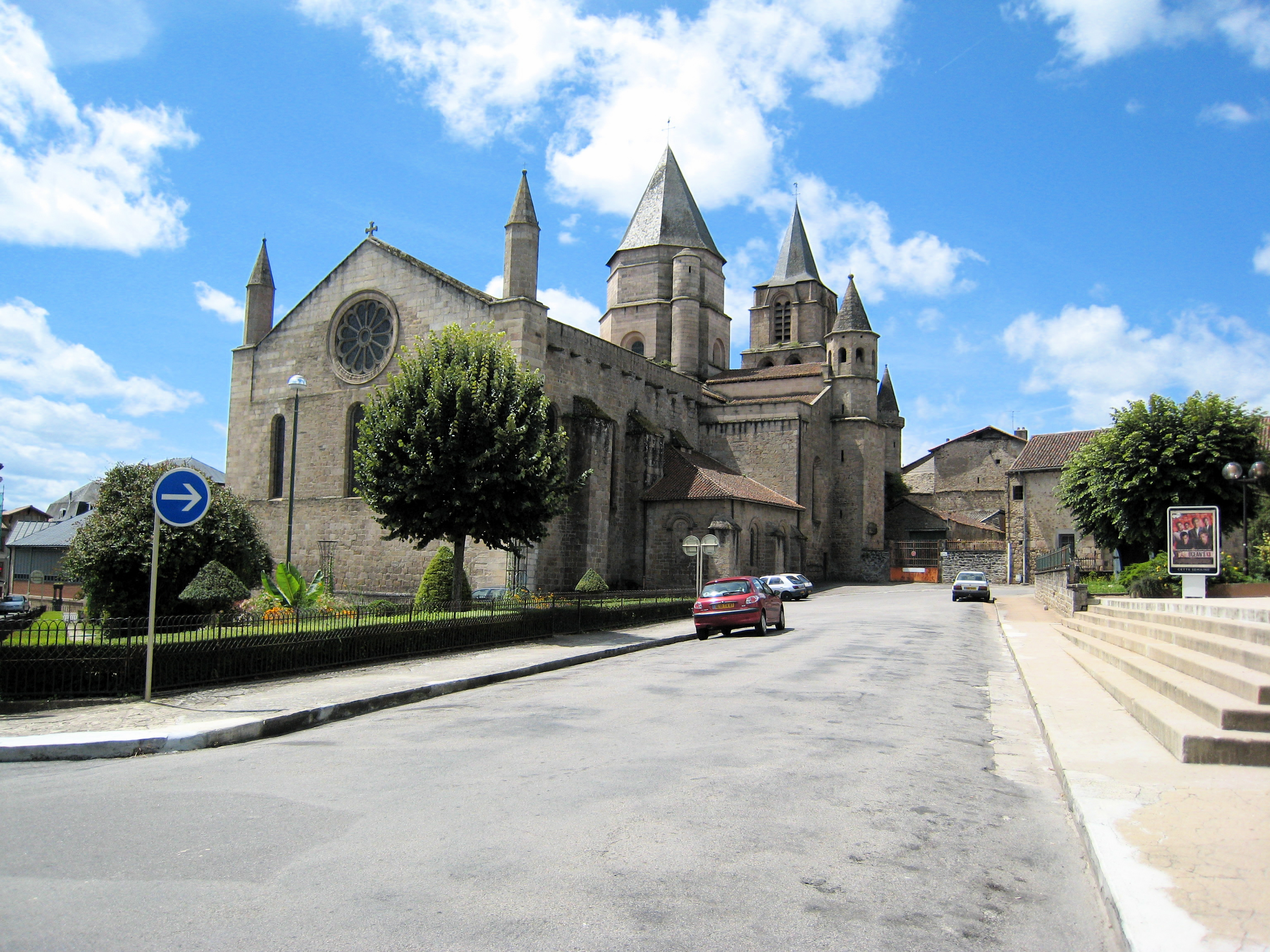 Collégiale de Saint-Junien, 87, France